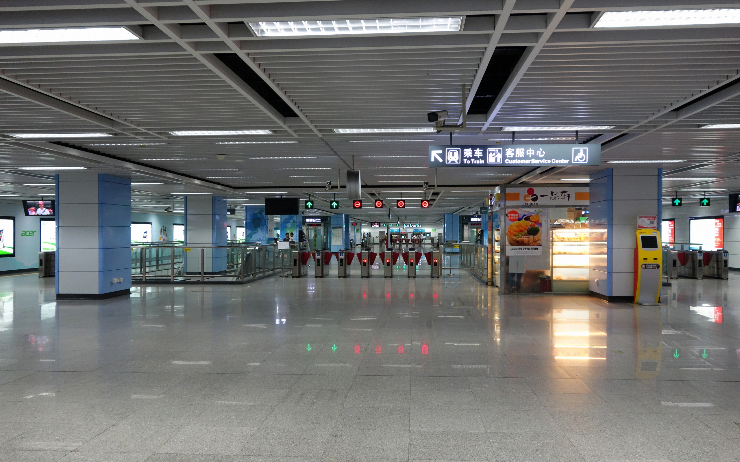 深圳地铁龙岗线华新站站厅